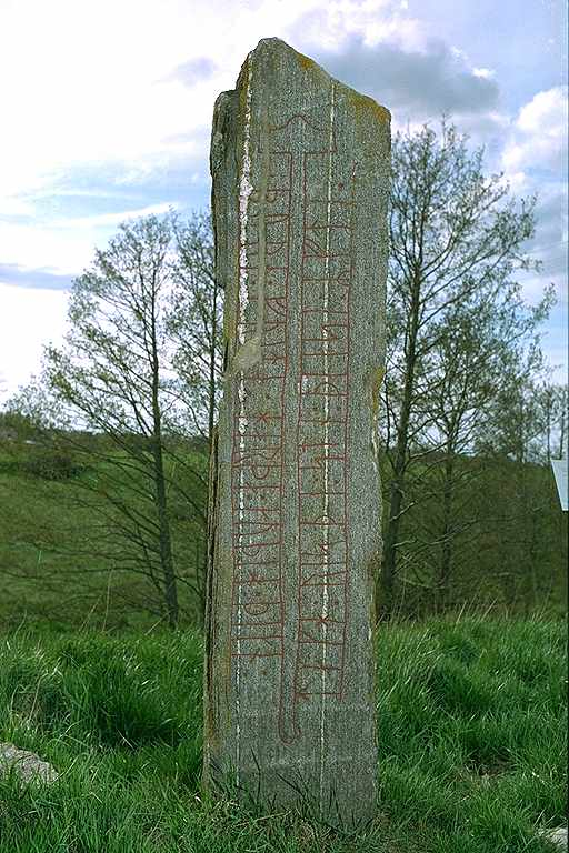 Inskriften lyder: Dag reste denna sten efter Björn, (sin) frände, en mycket god tägn. Motiv: Vg113 Bjärby Töfta Lärkegapet Nyckelord: Runor Kategori: Runristning/runsten Inskriften lyder: Dag reste denna sten efter Björn, (sin) frände, en mycket god tägn.